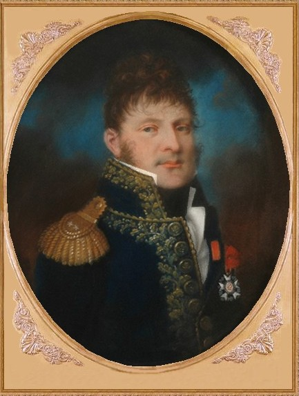 Général Hulin